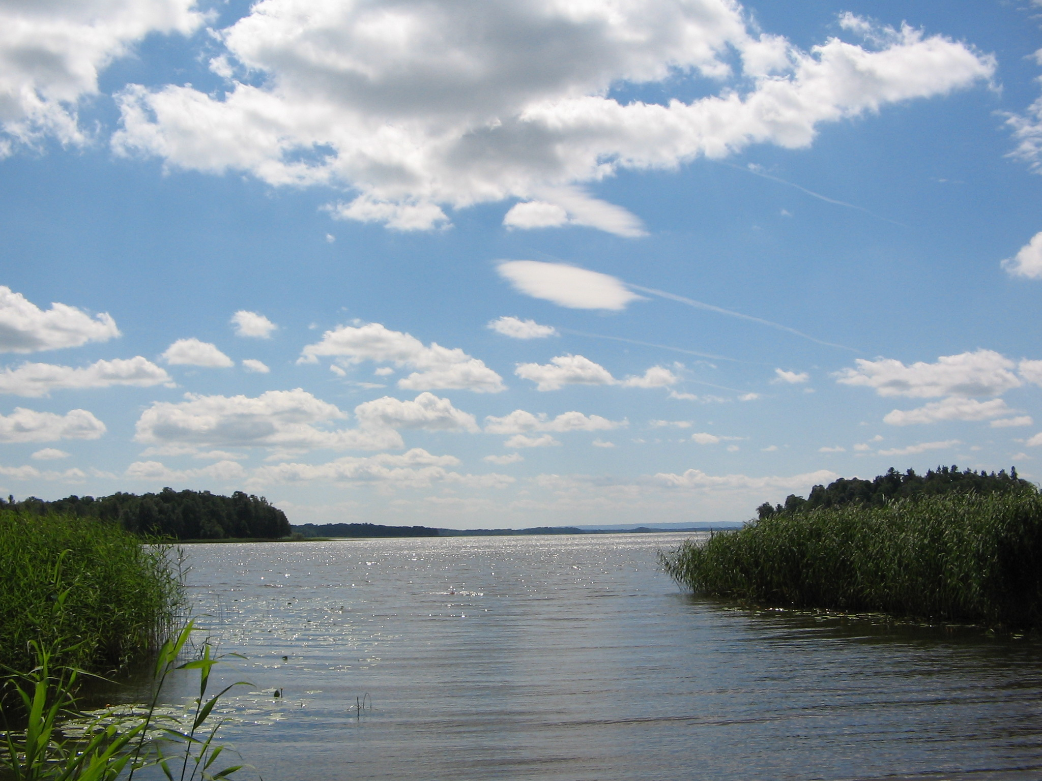 Sjön Ymsen, bild tagen 2005 av mig själv. Photograph taken by me